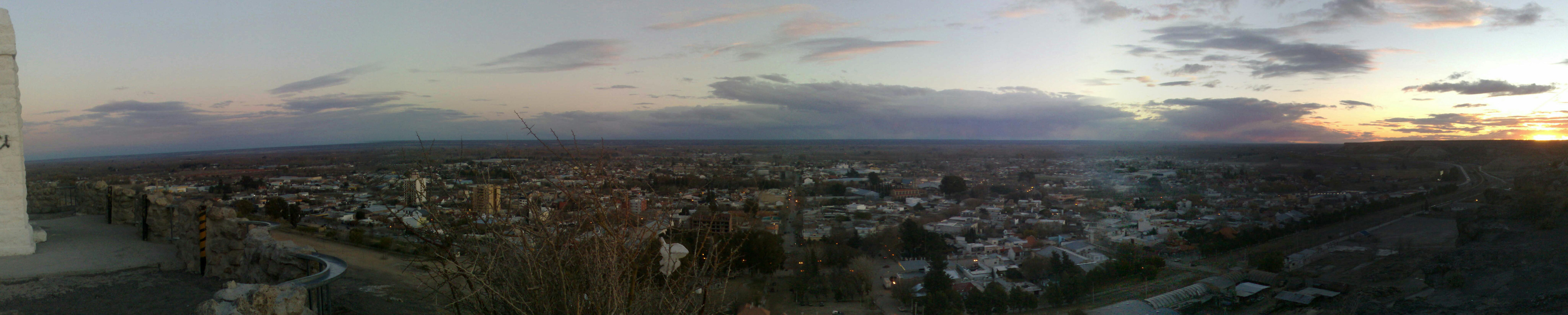 Foto panorámica de Villa Regina, Río Negro.